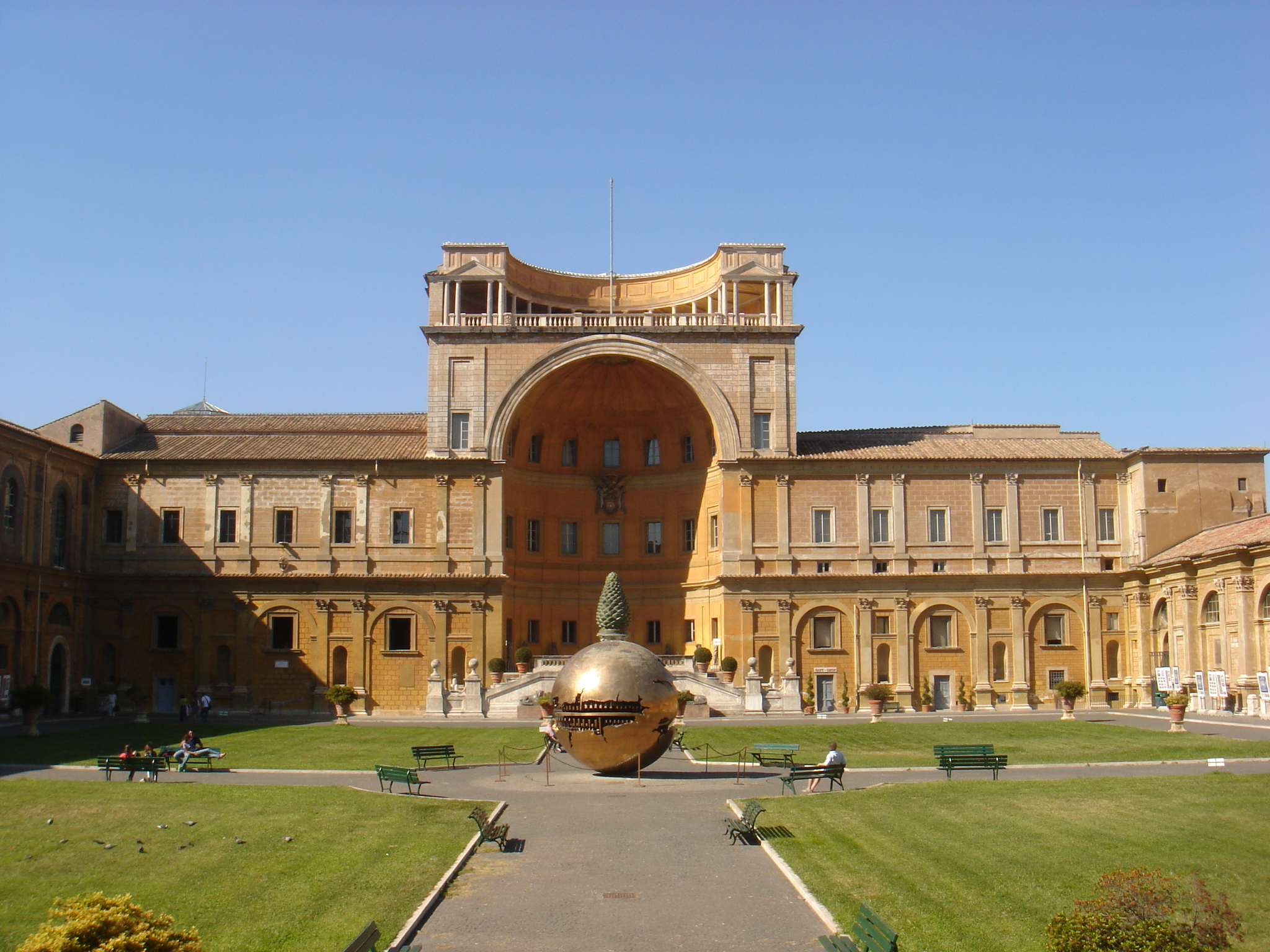 Roma, Palazzi vaticani: il cortile della Pigna con la Sfera di Arnaldo Pomodoro by Lalupa